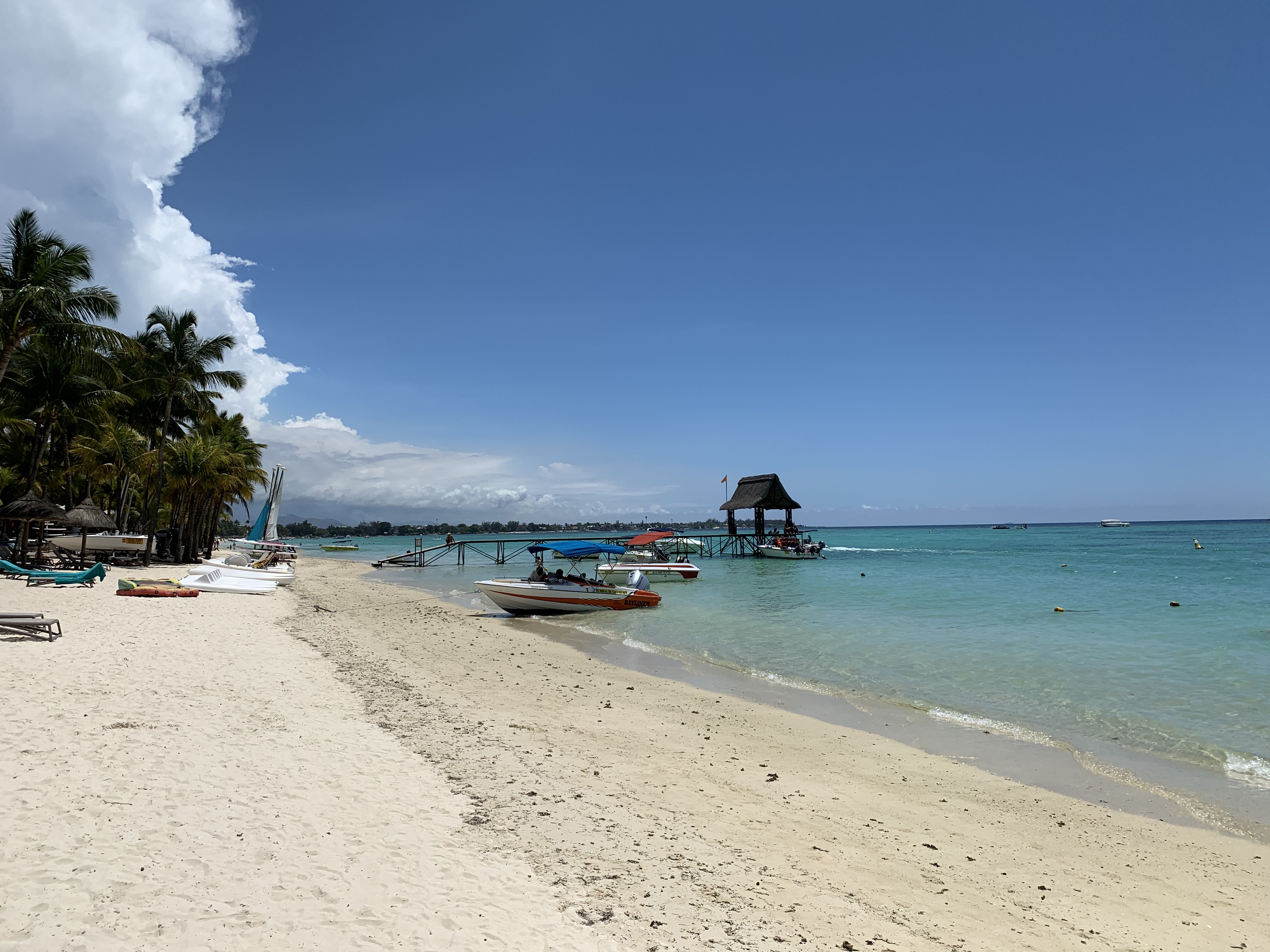 Пляж